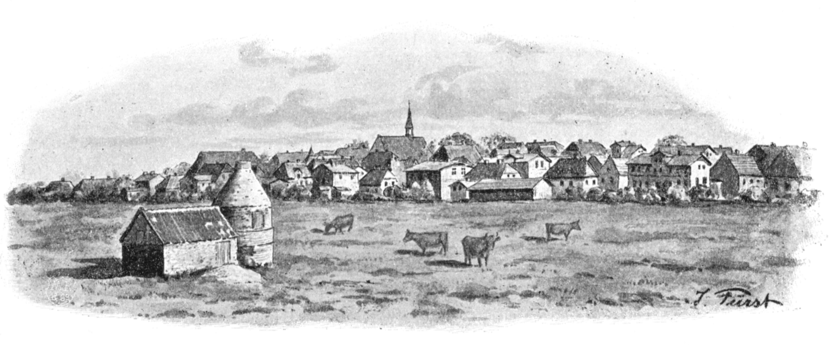 Büsum um 1895, Zeichnung von Julius Fürst